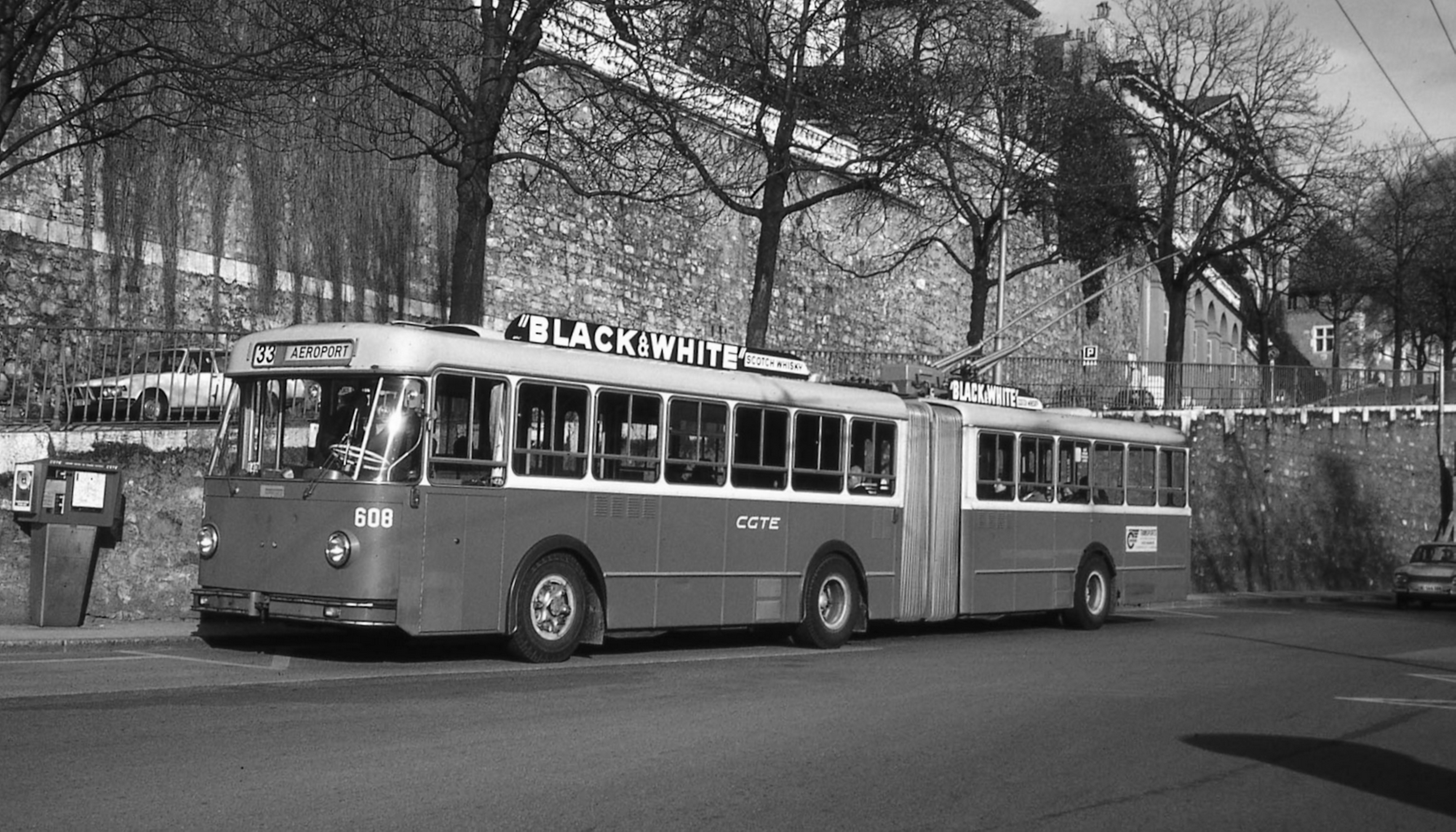 Trolleybus articulé Berna n° 608 - Ligne 33 - Place Neuve. Compagnie genevoise des tramways électriques.